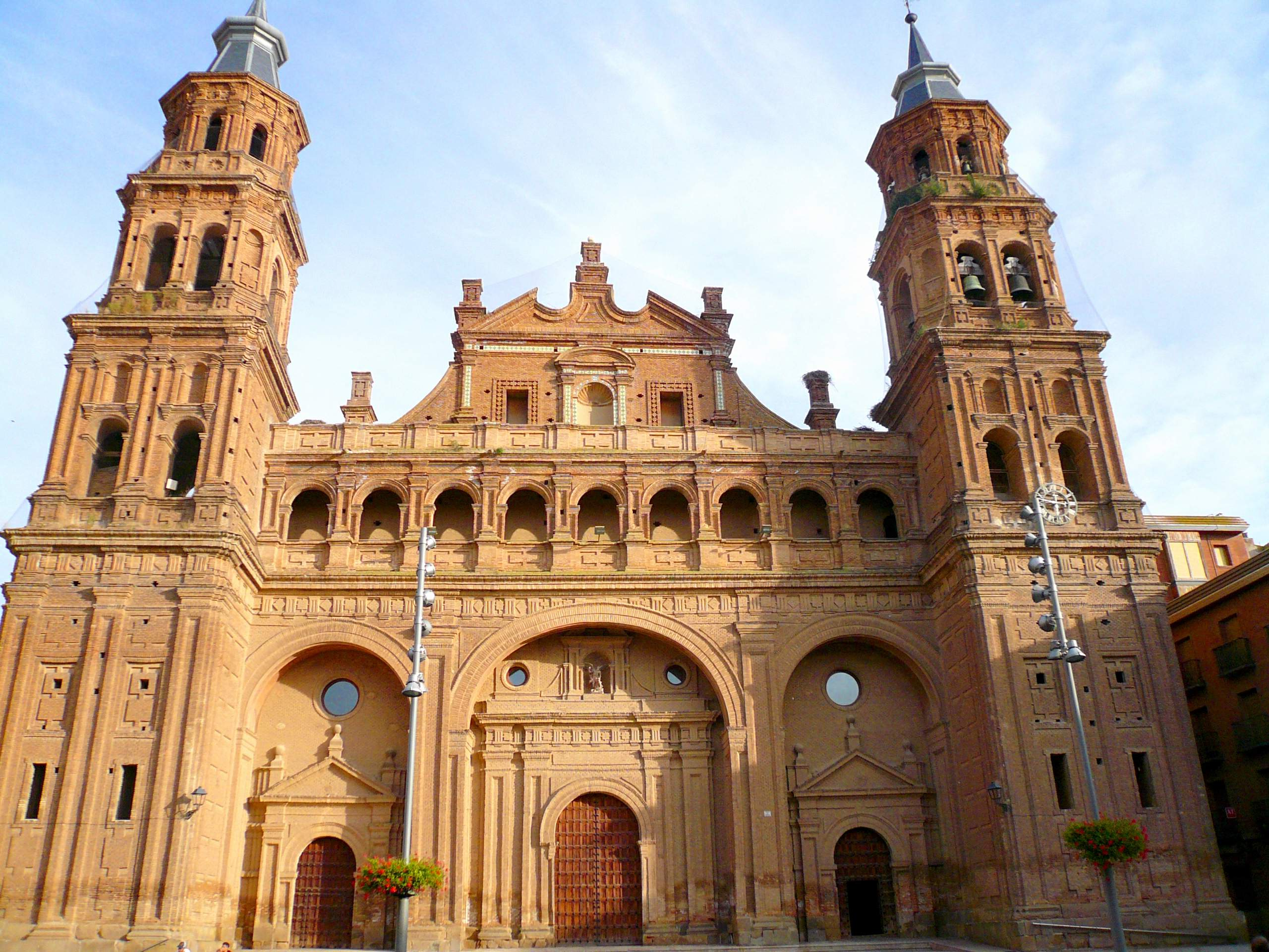 Colegiata de San Miguel (Alfaro, La Rioja)